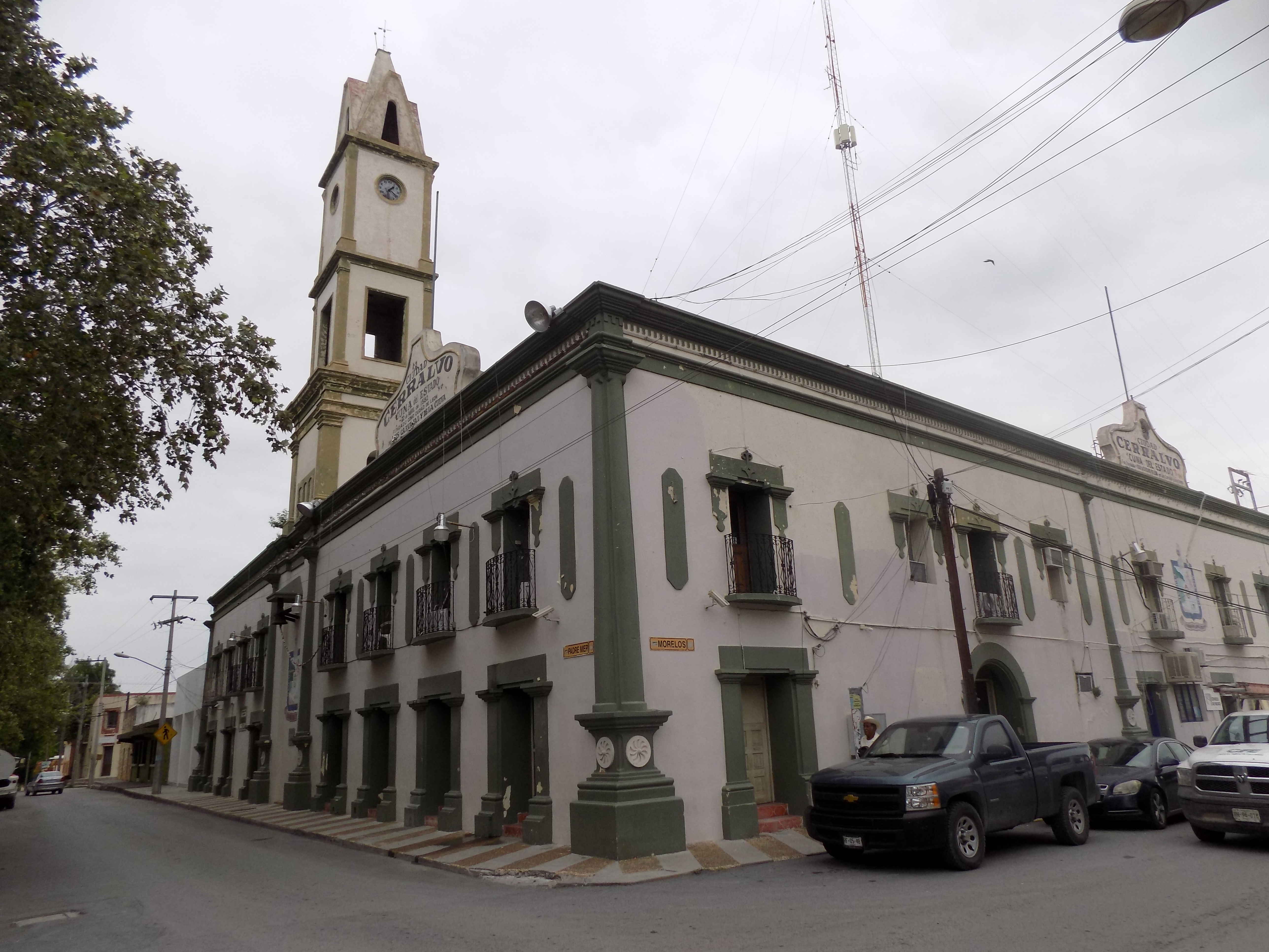 VISTA DEL PALACIO DE CERRALVO